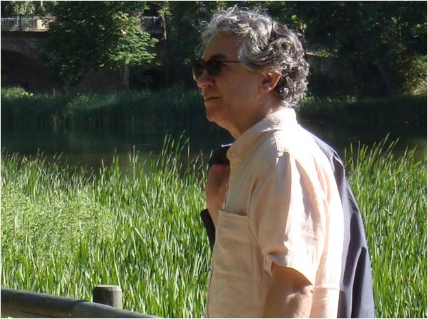 El escritor Juan Malpartida